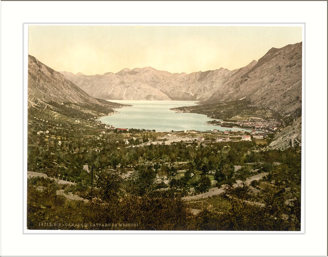 Cattaro general view and channel Dalmatia Austro-Hungary